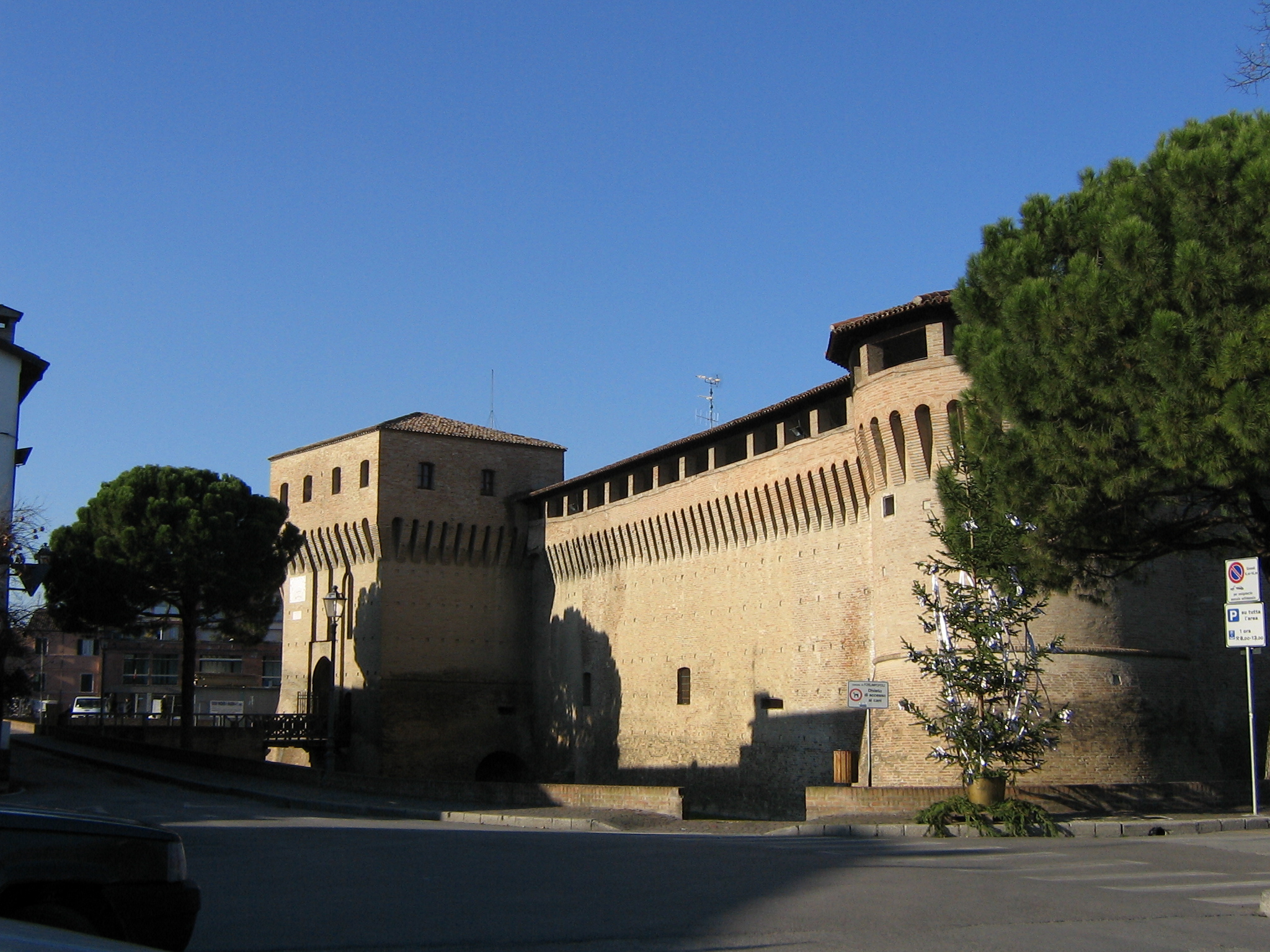 Rocca Albornoziana, Forlimpopoli (FC), Italy